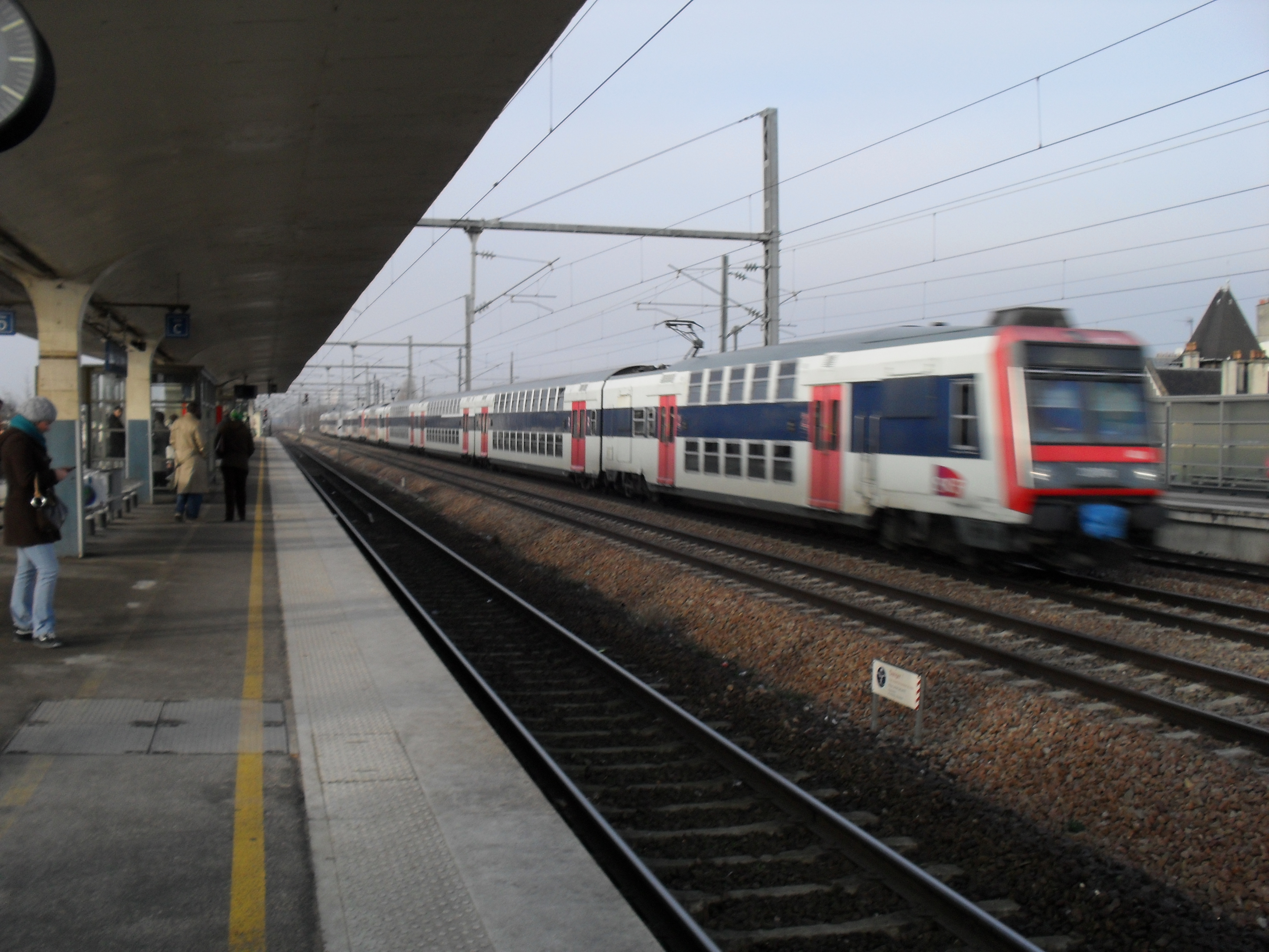 Z 20500 assurant la mission ZIMO à destination de Château-Thierry passant sans s'arrêter à Chelles-Gournay